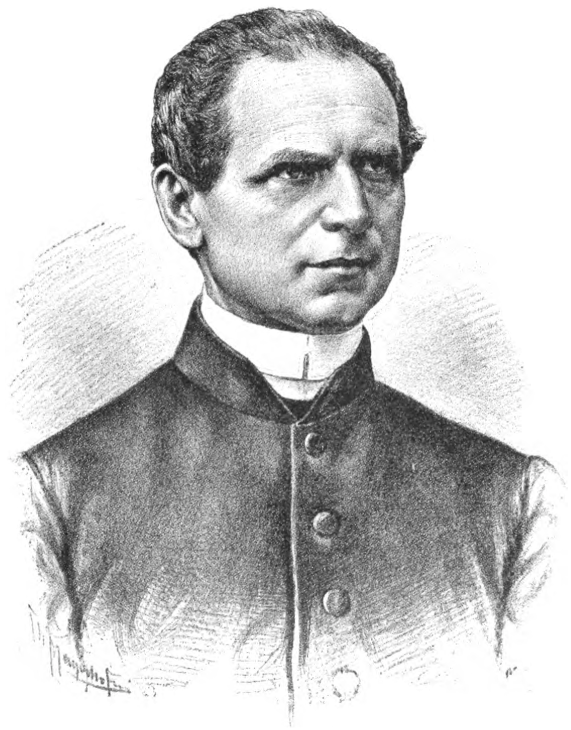 Luka Jeran (1818 - 1896), slovenski misijonar, pesnik, nabožni pisatelj in urednik